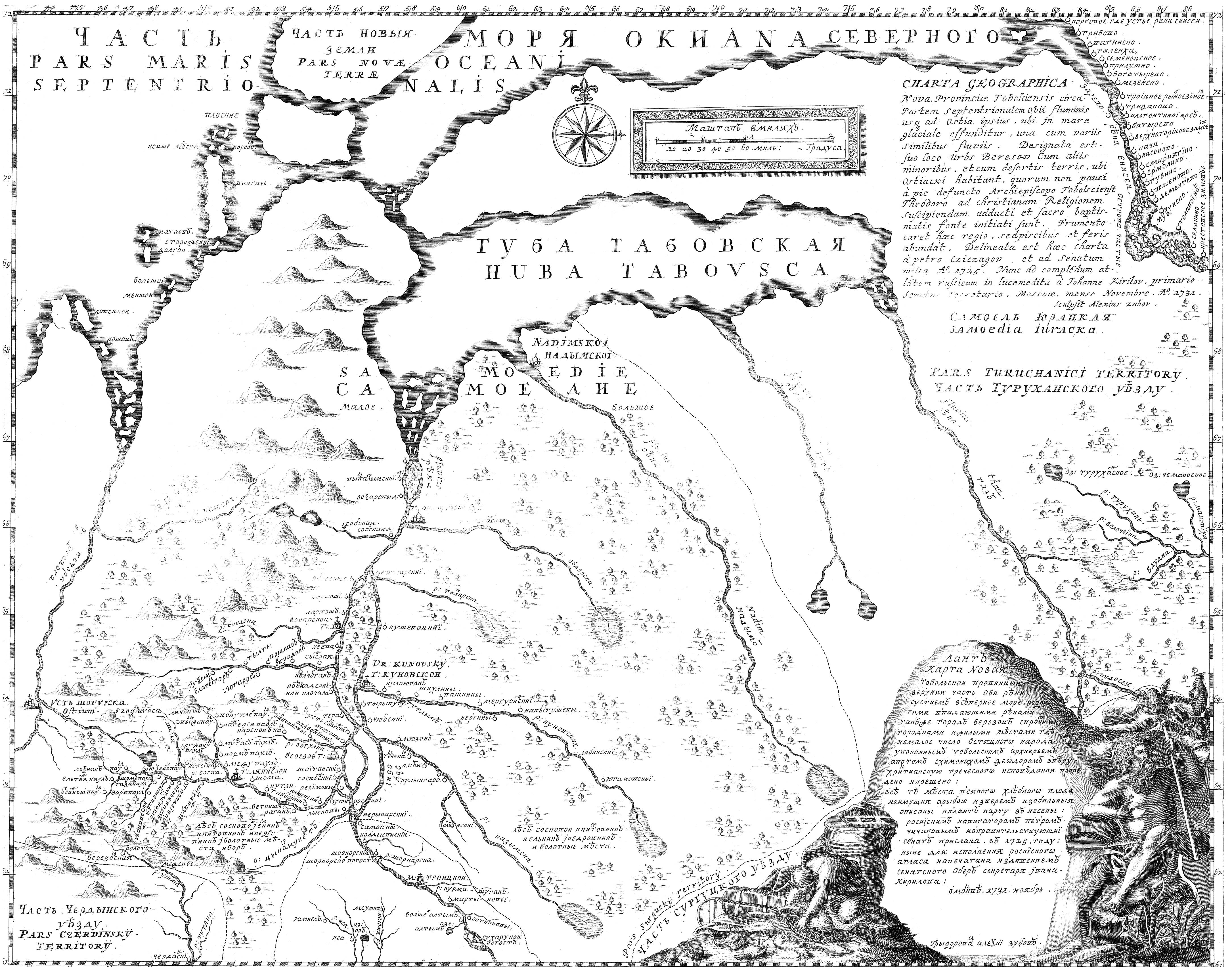 Тобольская провинция в «Атласе Всероссийской империи» И. К. Кириллова. 1722-1737 гг.